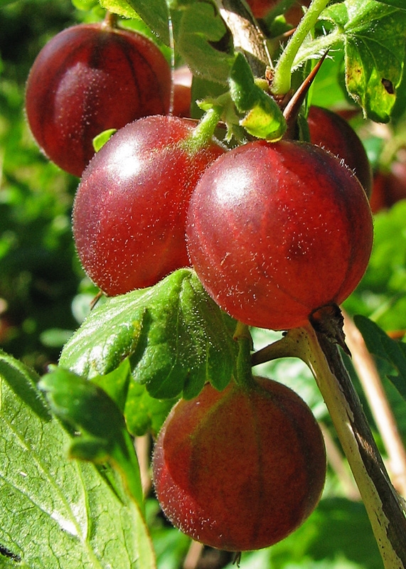 Stachelbeere (Ribes uva-crispa)